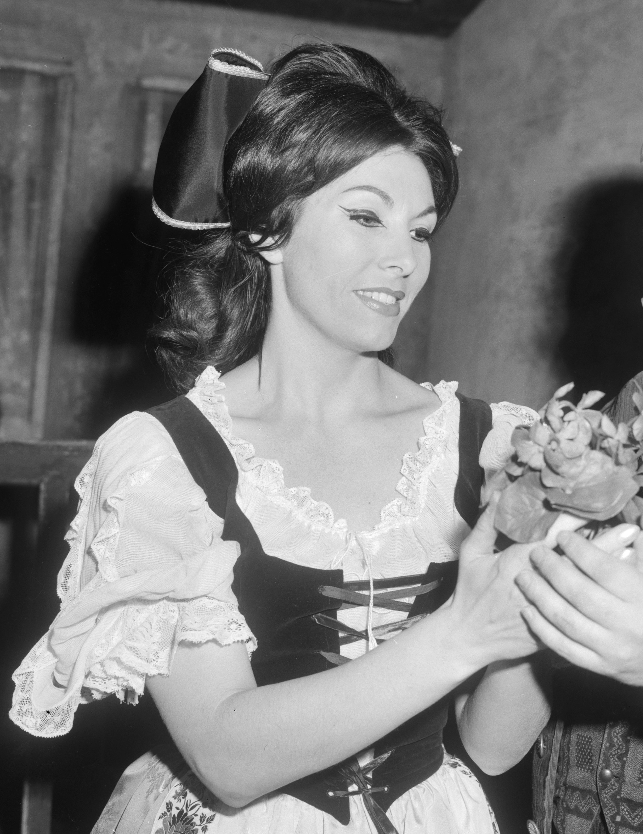 Herdenking honderdste geboortedag van Pietro Mascagni de Nederlandse Opera , Rosanna Carleri